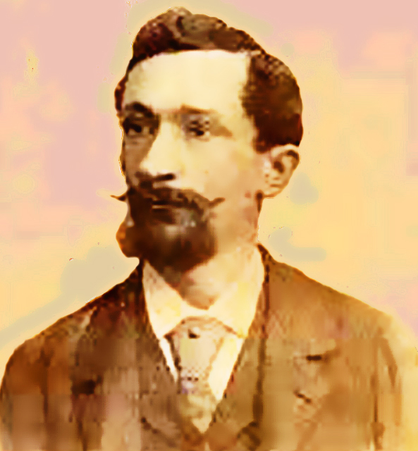 Cliché coloré de Jean-Baptiste Reboul, auteur de la "Cuisinière provençale"